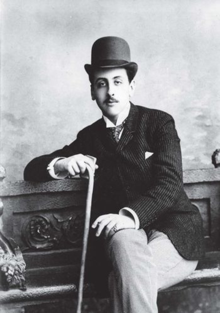 Елим Павлович Демидов. Фотопортрет. 1890-е гг. Из книги “Демидовы. Родословная роспись». Екатеринбург, 1992 г.